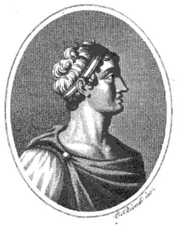 Gerone II in un'incisione di Giuseppe Emanuele Ortolani nel suo librio sulle biografie degli uomini illustri di Sicilia